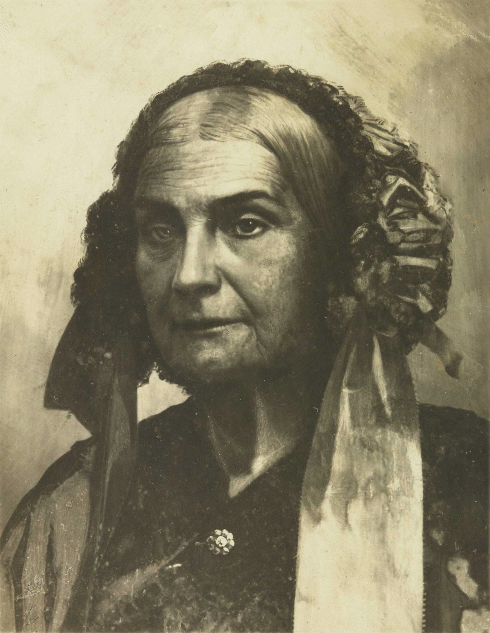 Retrato de Domitila de Castro Canto e Melo, Marquesa de Santos.